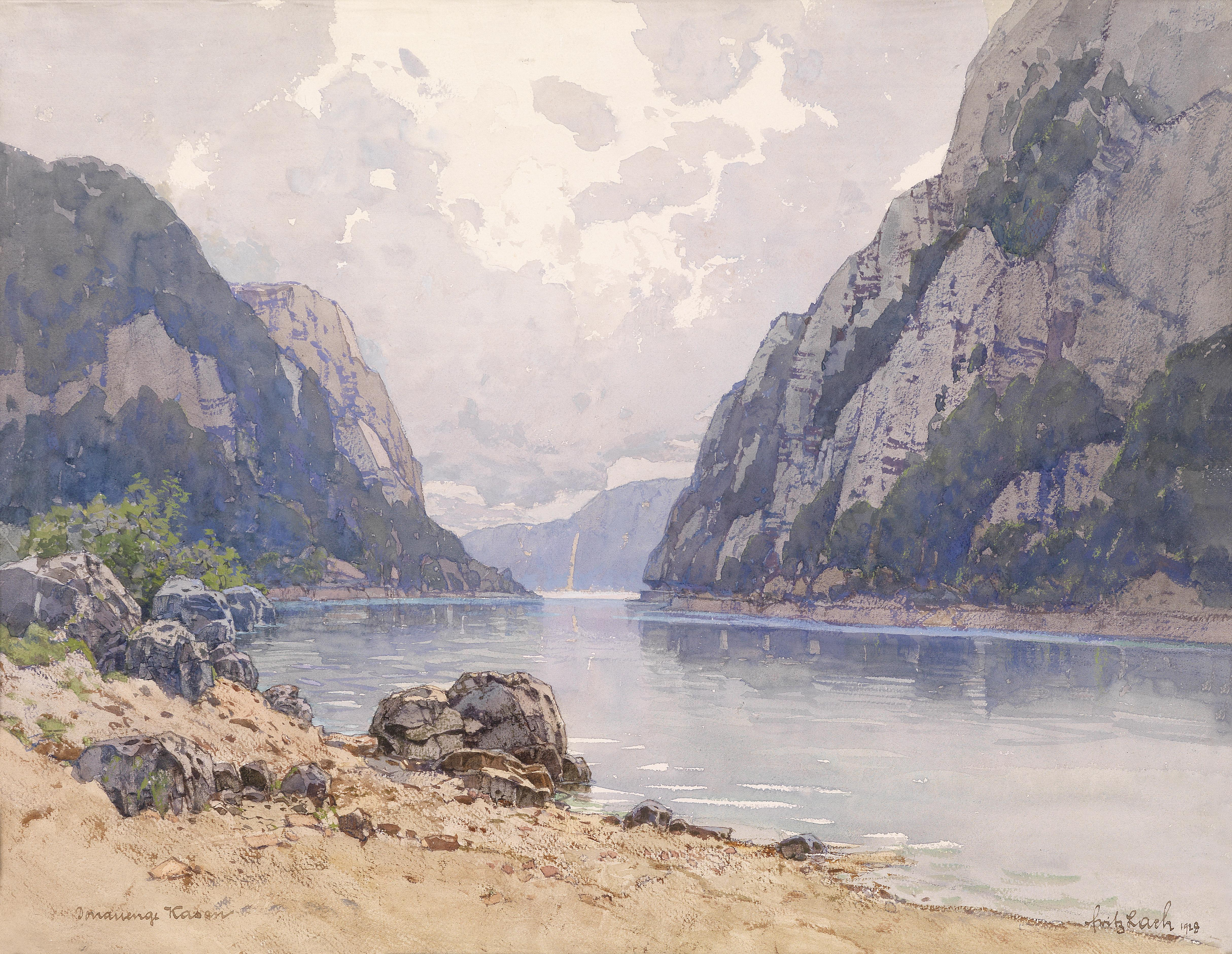 Auktion Meisterzeichnungen, Druckgraphik bis 1900, Aquarelle u. Miniaturen, Auktionstermin: 24.03.2011 - 16:00, Auktionsort: Palais Dorotheum